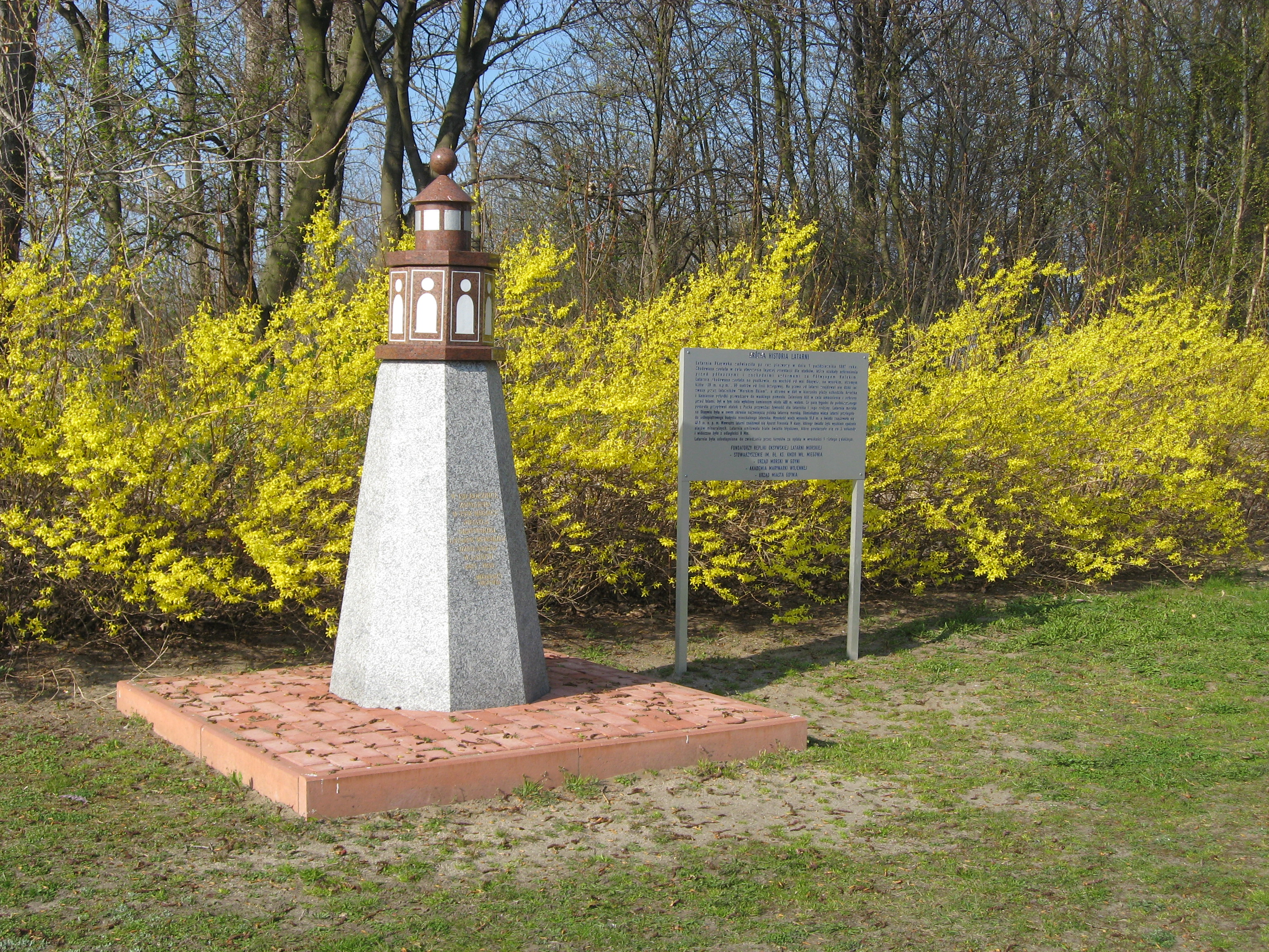 Model Latarni morskiej w Gdyni-Oksywiu, odsłonięty 1 października 2007. Napis na latarni brzmi: W 120 ROCZNICĘ ZAPALENIA W TYM MIEJSCU ŚWIATŁA OKSYWSKIEJ LATARNI MORSKIEJ DZIAŁAJĄCEJ W LATACH 1887-1933 - MIŁOŚNICY OKSYWIA